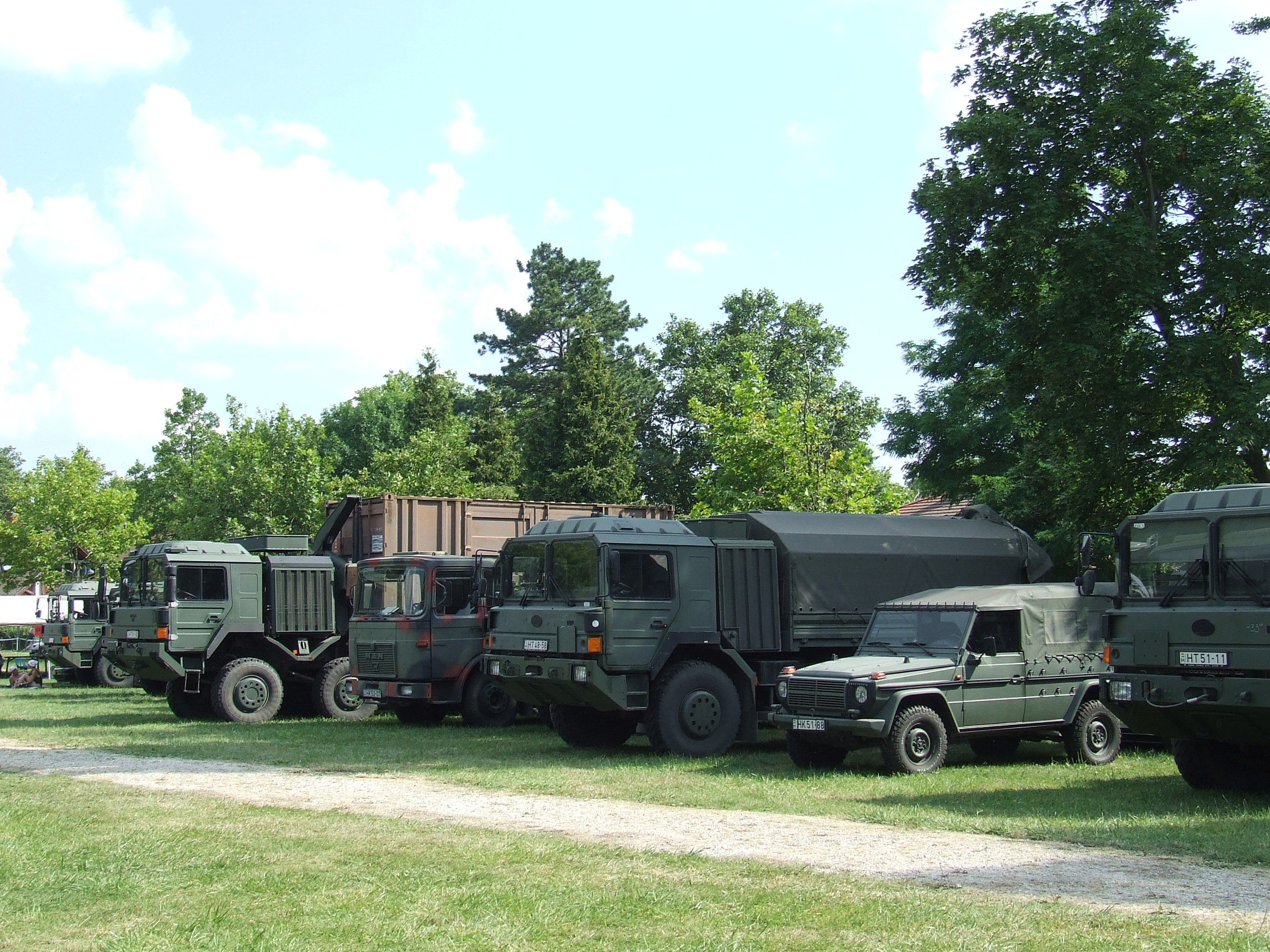 Balatonboglár, katonai járművek